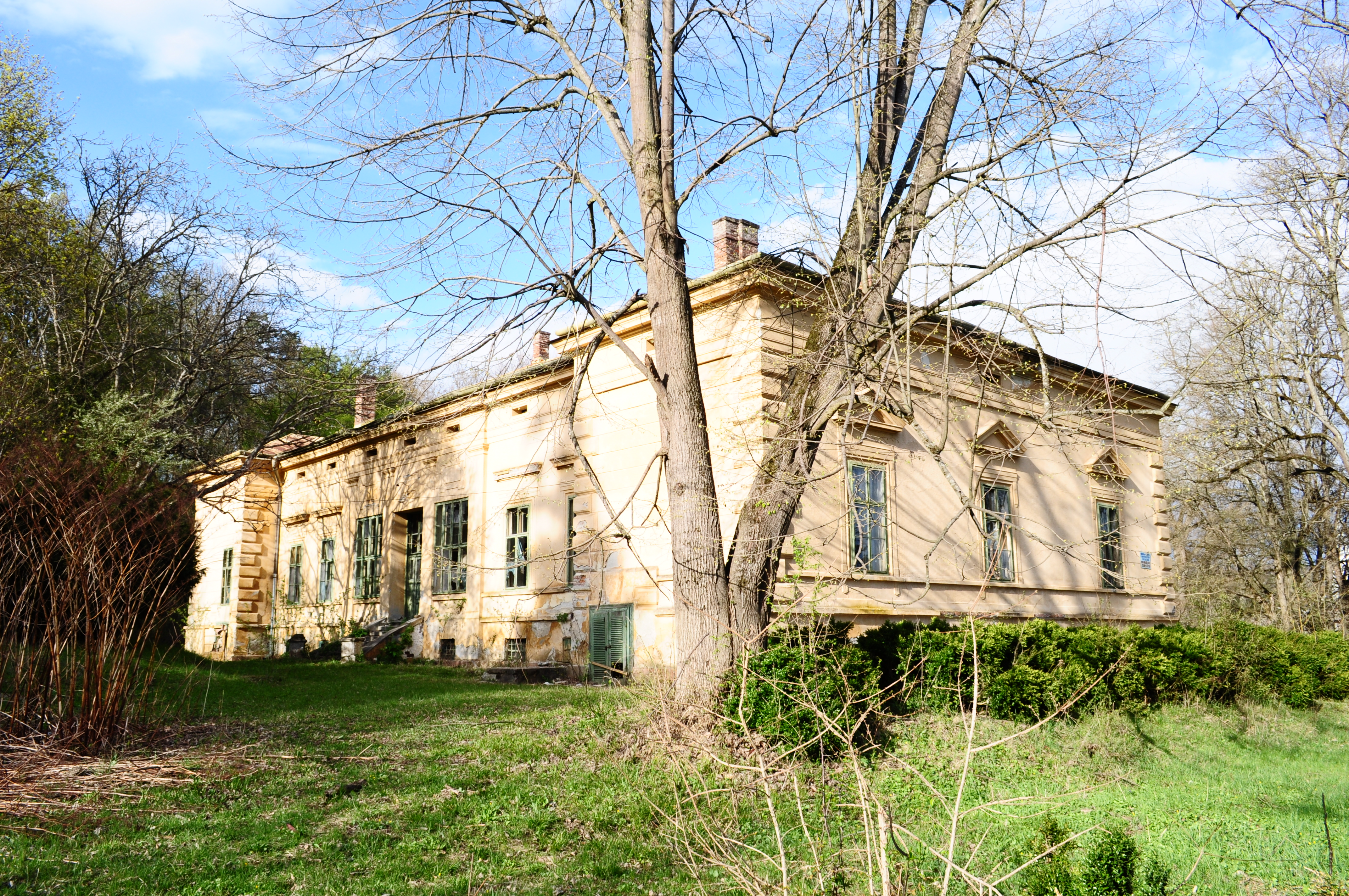 Castelul Konopi, sat ODVOŞ; comuna CONOP 01